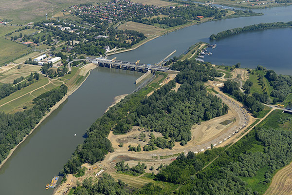 Kiskörei vízerőmű